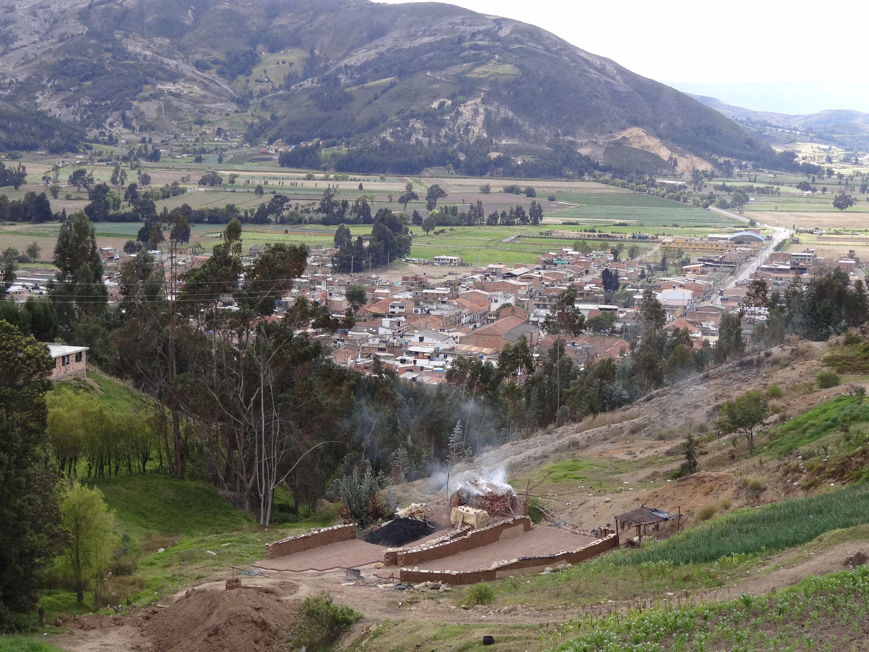 Detalle del área urbana del municipio de Samacá, departamento de Boyacá, Colombia